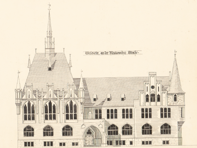 Entwurf zu einem Kreisständehaus für Beuthen (Bytom) aus dem Jahr 1896, Westseitenansicht